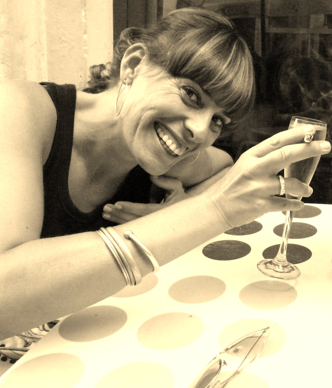 Neus Sanz